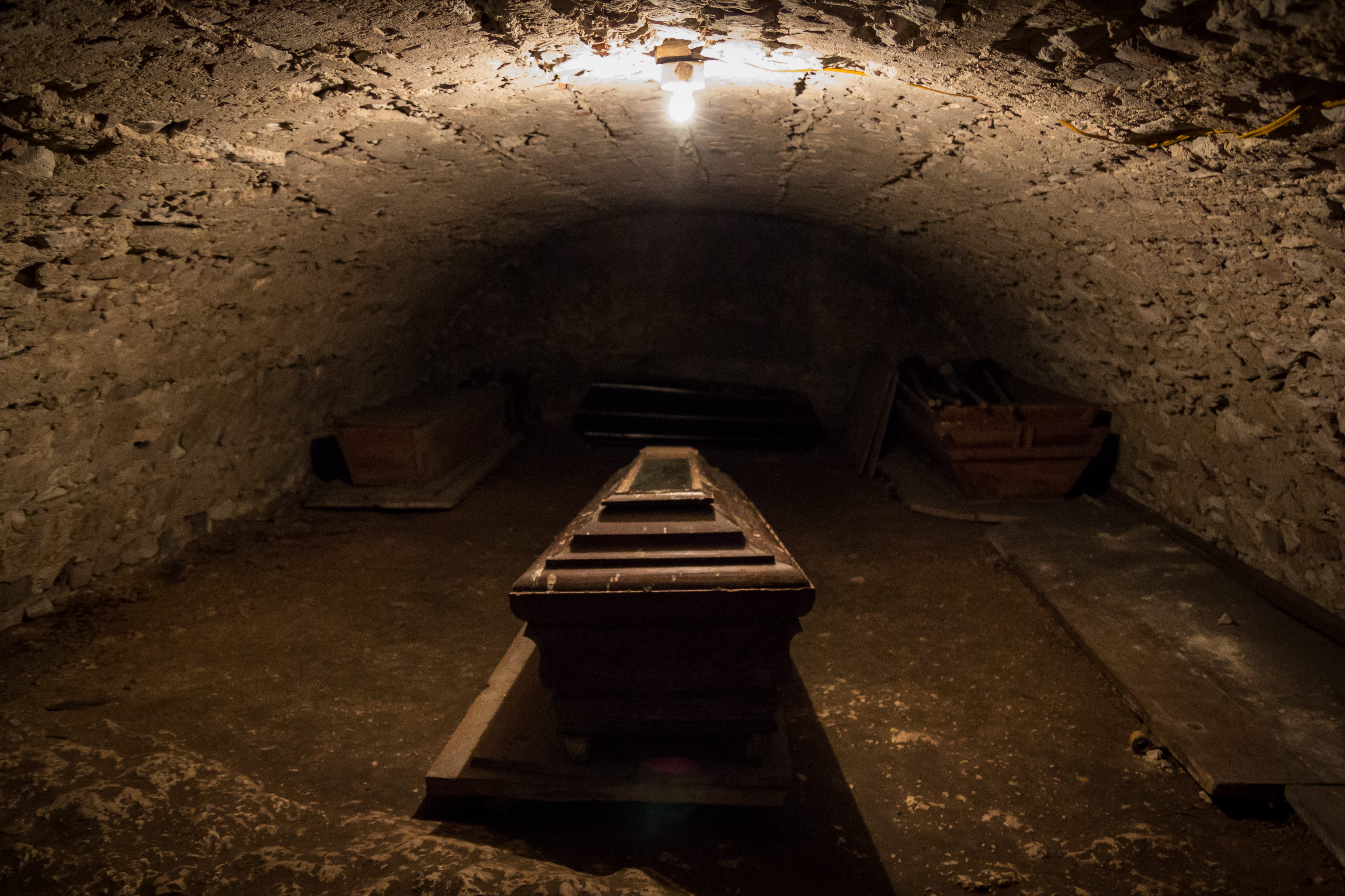 Krypta w kościele św. Jana Chrzciciela w Olsztynie.